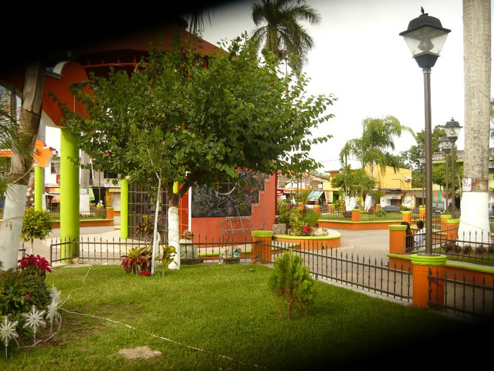 esta es la foto de la plaza de tamasopo